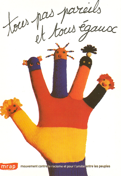 « Tous pas pareils et tous égaux », carte postale MRAP du 21 mars, journée internationale pour l'élimination de la discrimination raciale.